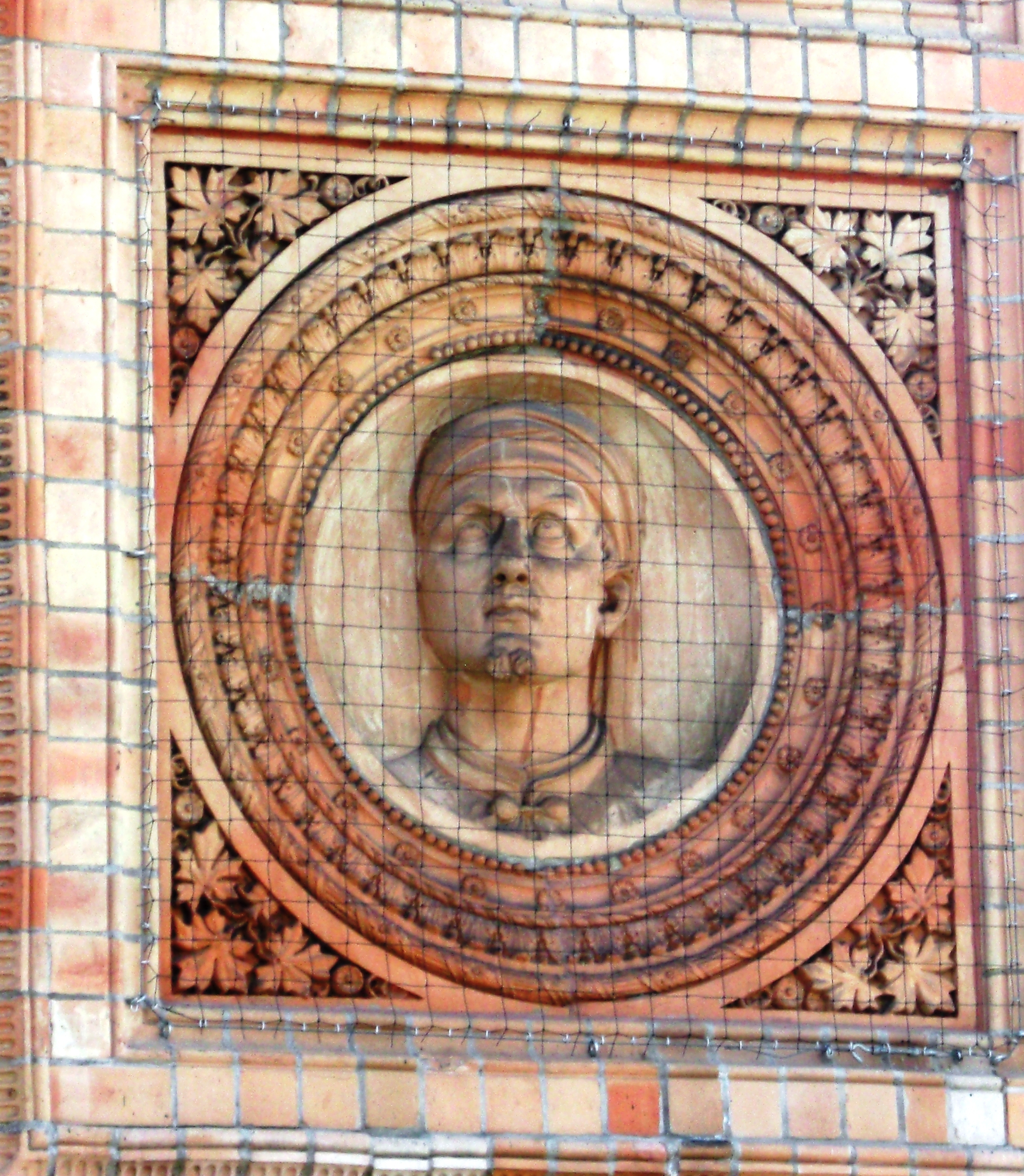 Medaillon von Andrea Orcagna (etwa 1320-1368), Maler, Bildhauer und ArchitektThis is a photograph of an architectural monument.